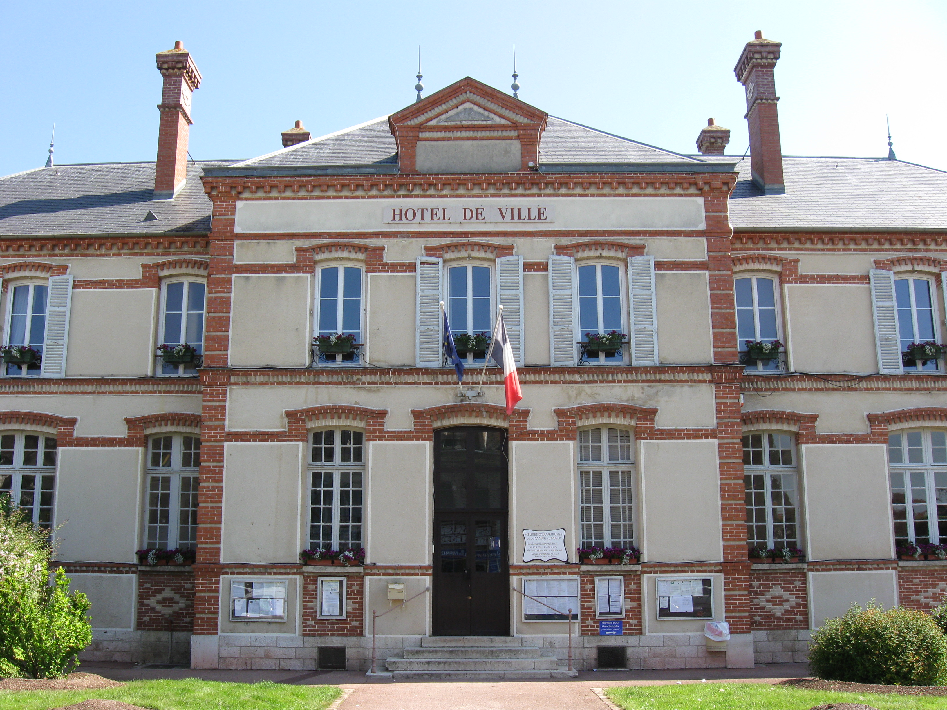 Mairie de Bray-sur-Seine. (département de la Seine-et-Marne, région Île-de-France).